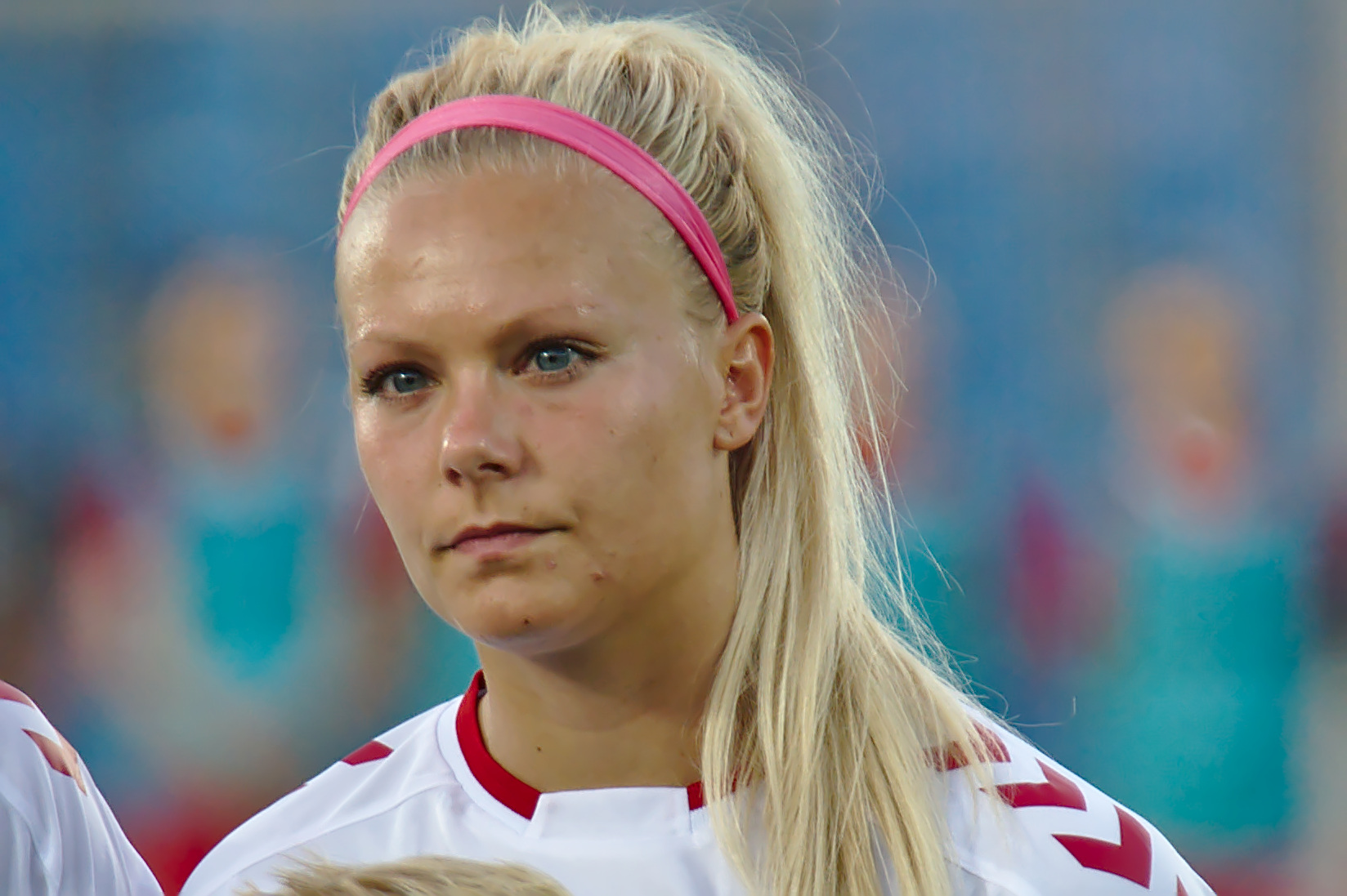 Freundschaftsspiel ÖFB Damen Nationalmannschaft gegen Dänemark am 6. Juli 2017. Bild zeigt: Line S. Jensen